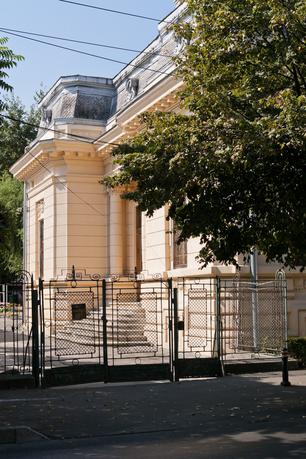 Fotografia prezinta casa Dr. Florescu, de pe bd. Republicii 84.